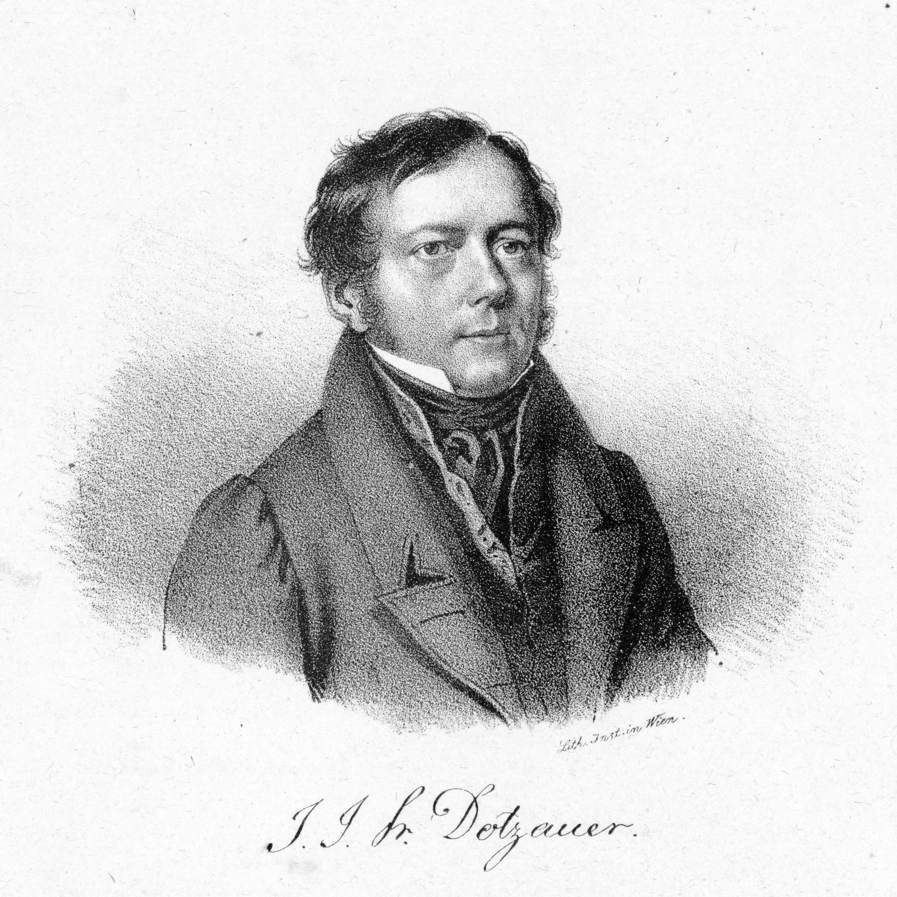 Justus Johann Friedrich Dotzauerl